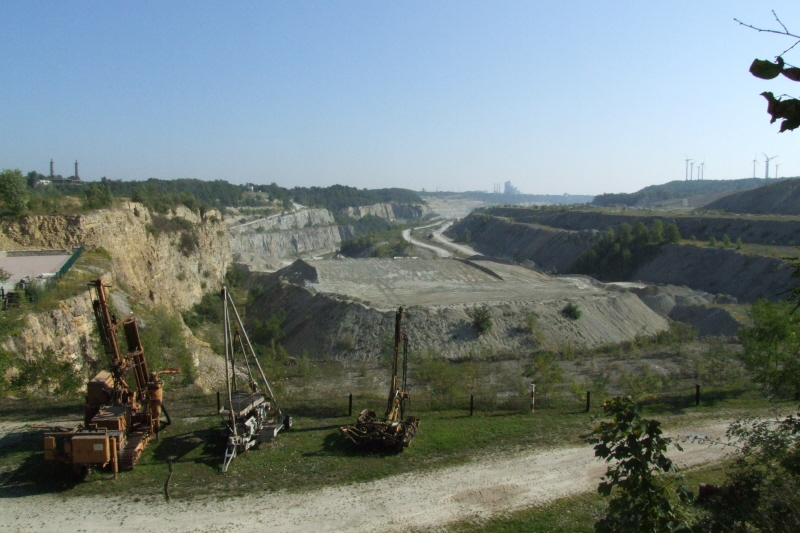 Museumsbark Rüdersdorf: Blick über den Steinbruch Fotograf: Harald Rossa Datum: 3. Oktober 2006 Höher aufgelöste Version ist verfügbar